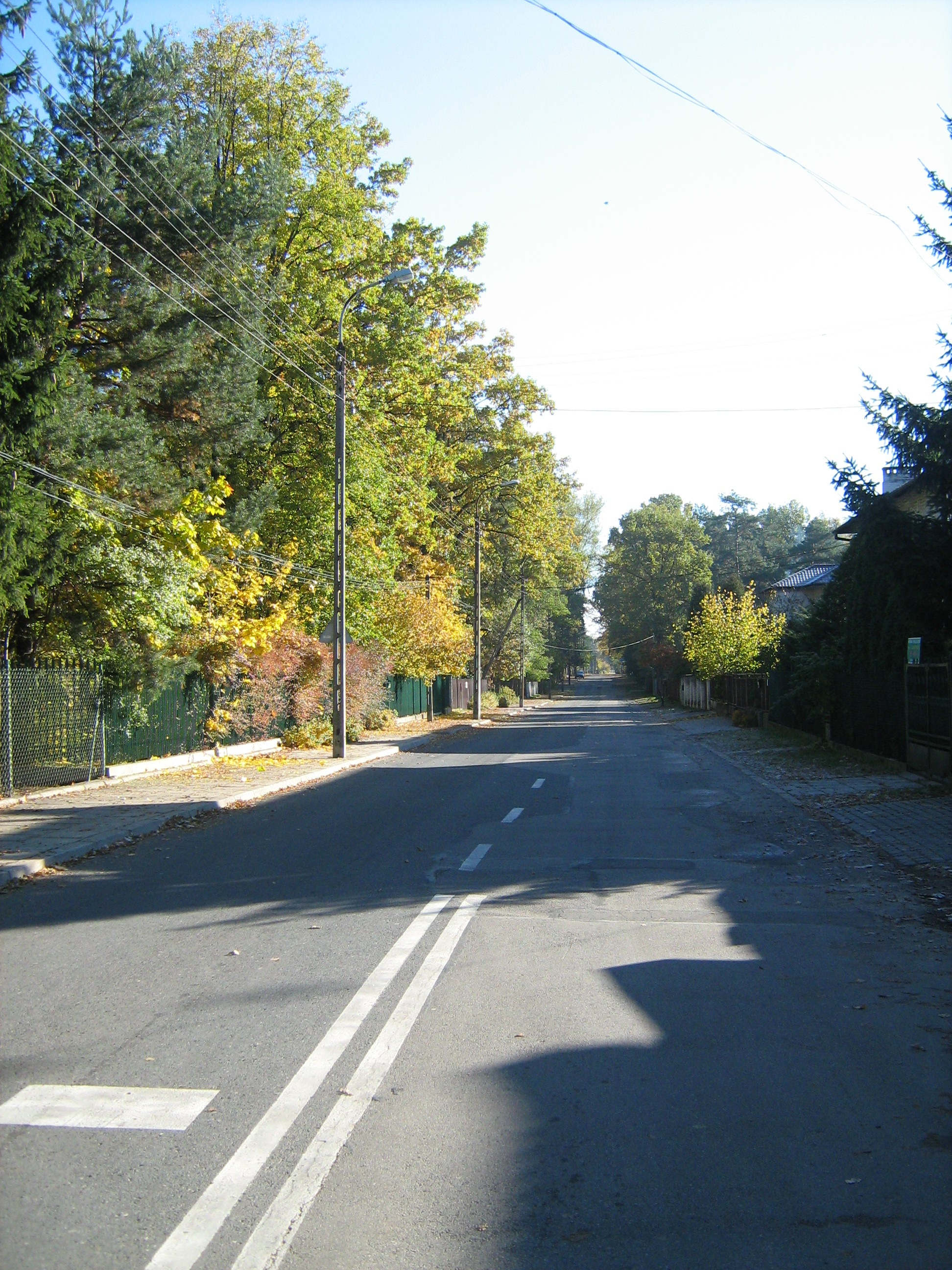 Wladyslaw Sikorski street in Warsaw Wesola (Poland) ulica gen. Władysława Sikorskiego w Warszawie-Wesołej